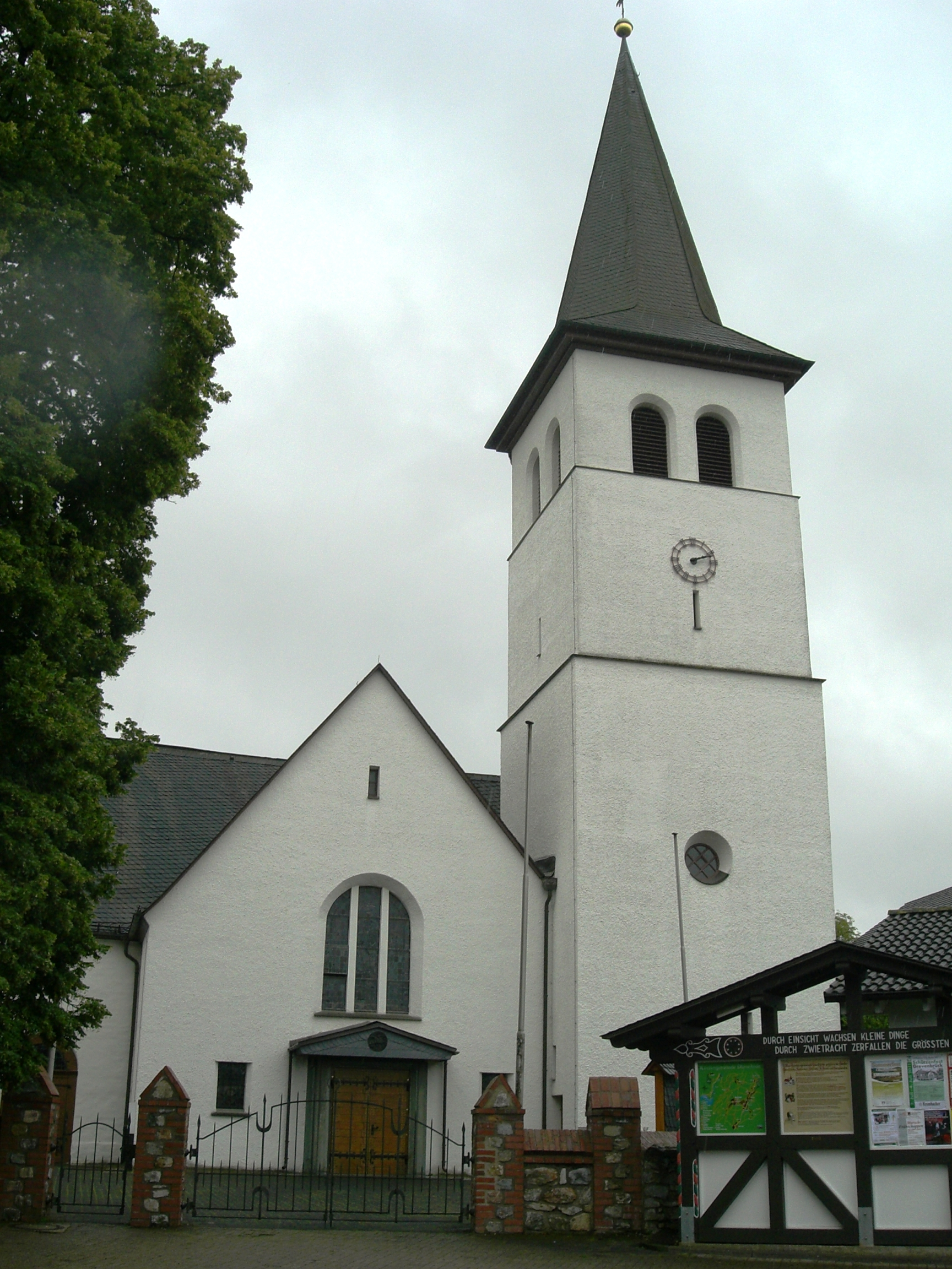 denkmalgeschützter romanischer Kirchbau